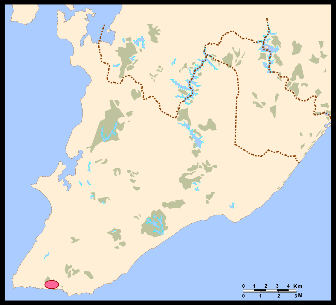 Bairro de Ondina - Mapa de Salvador (Bahia, Brazil)